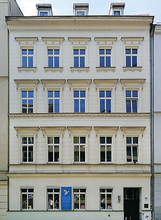 Fassade des Hauses Weinmeisterstraße 5 - LesArt, Berliner Zentrum für Kinder- und Jugendliteratur